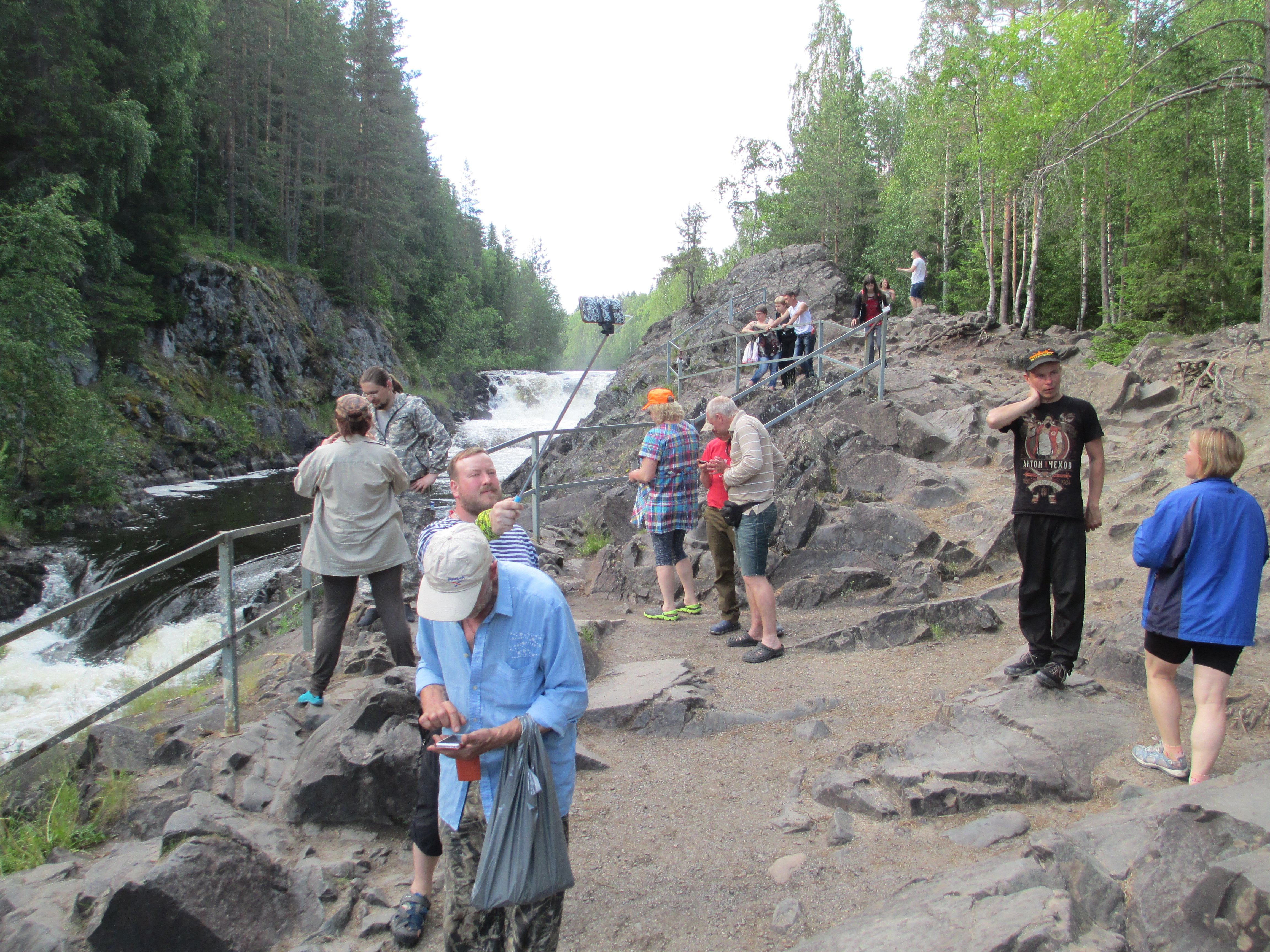 Туристы на фоне водопада Кивач в заповеднике "Кивач". Республика Карелия.